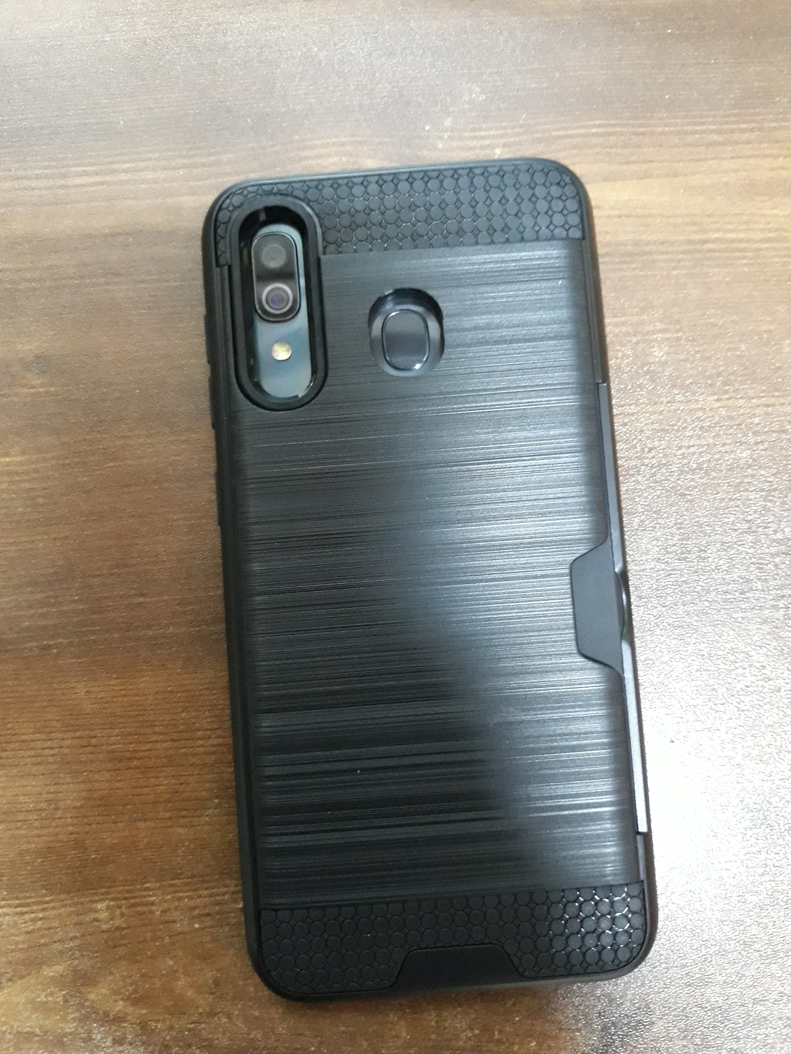 삼성 갤럭시 A30 뒷면